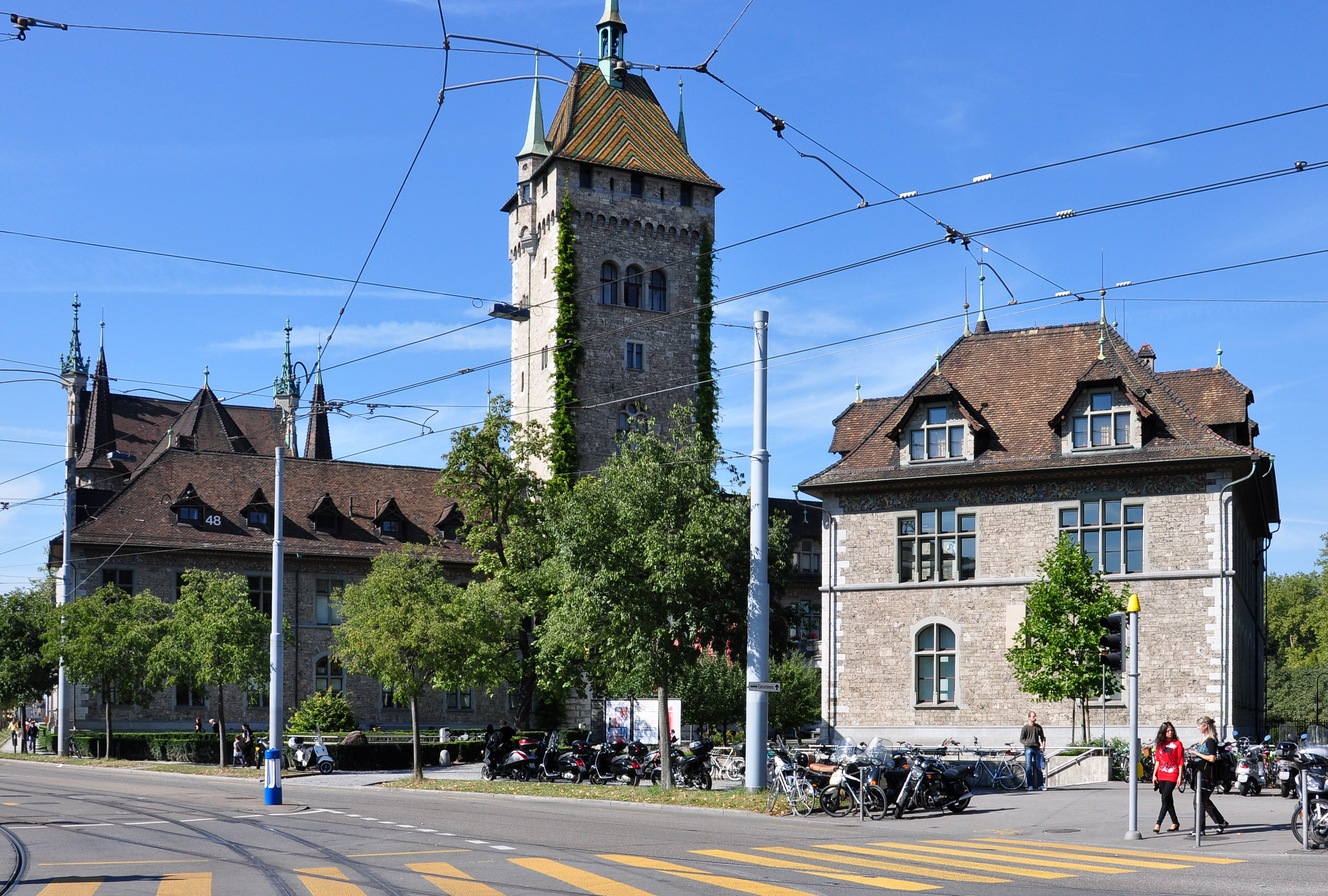 Landesmuseum in Zürich (Switzerland)